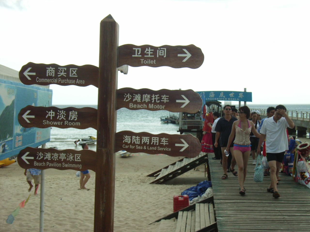 Yalong Bay National Resort, Sanya, Hainan Island, China User:HNPIX